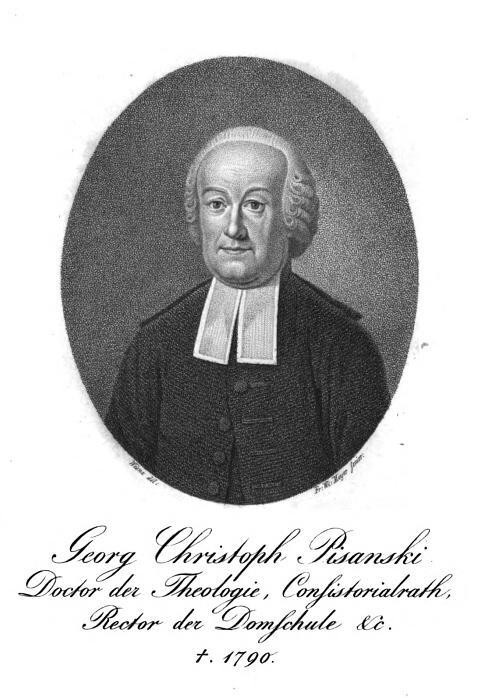 Georg Christoph Pisanski (Kupferstich)